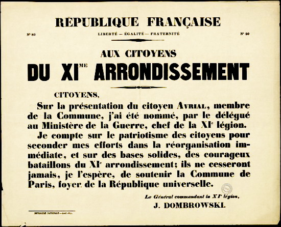 Affiche de Jarosław Dombrowski à destination des habitants du 11e arrondissement de Paris.